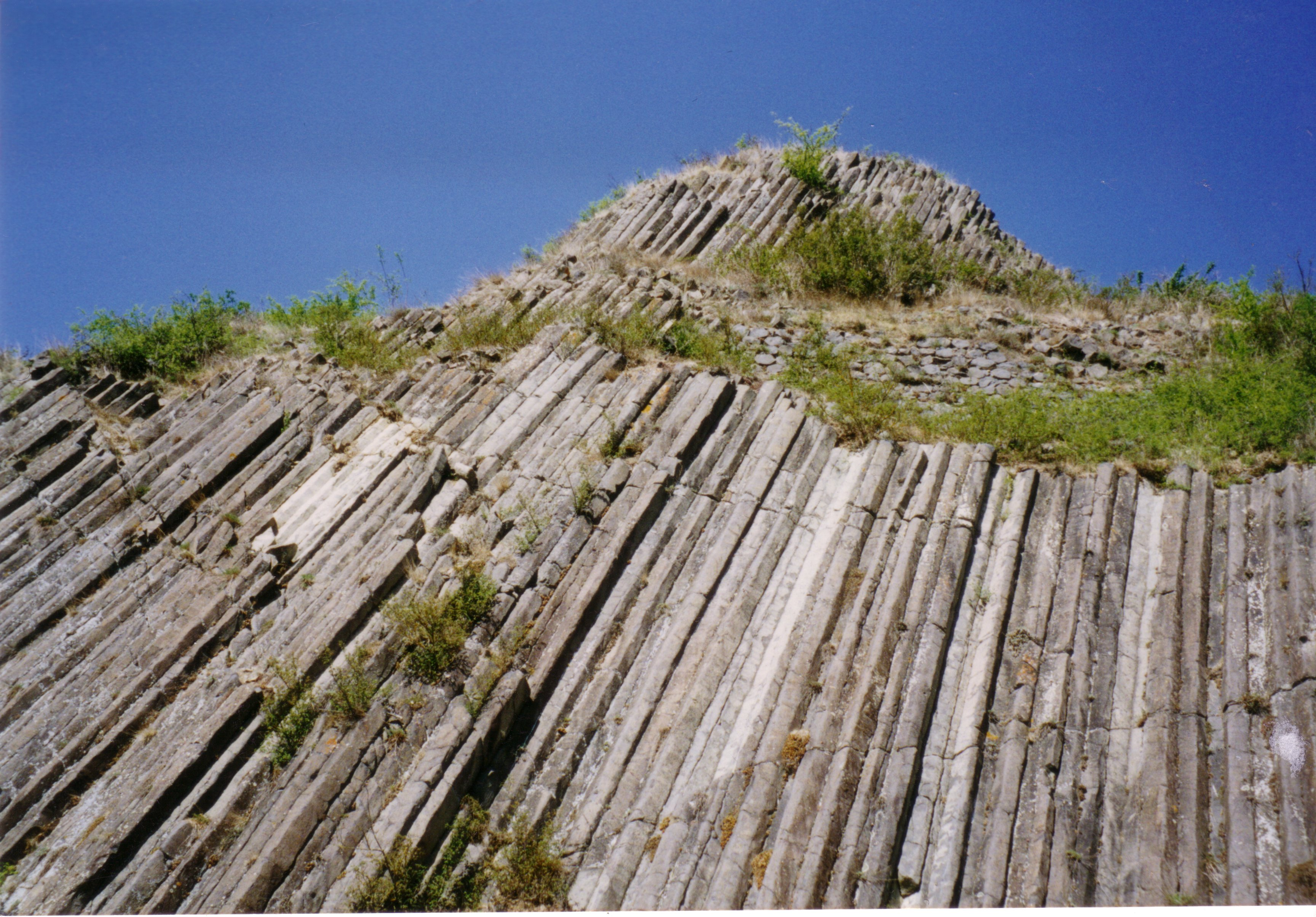 les orgues basaltiques situées à Usson (Puy-de-Dôme)